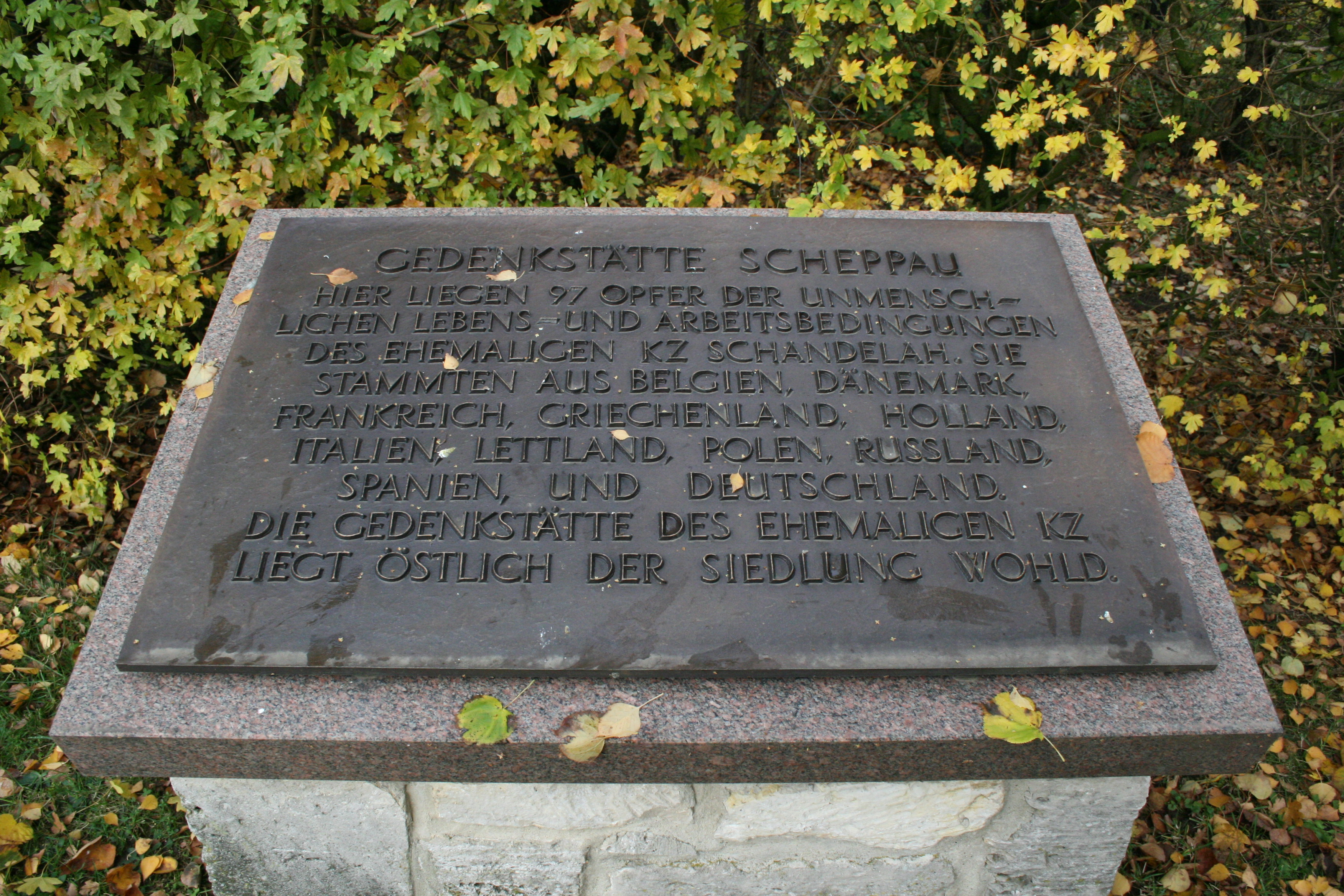 KZ Schandelah, Bronzetafel auf der Gedenkstätte